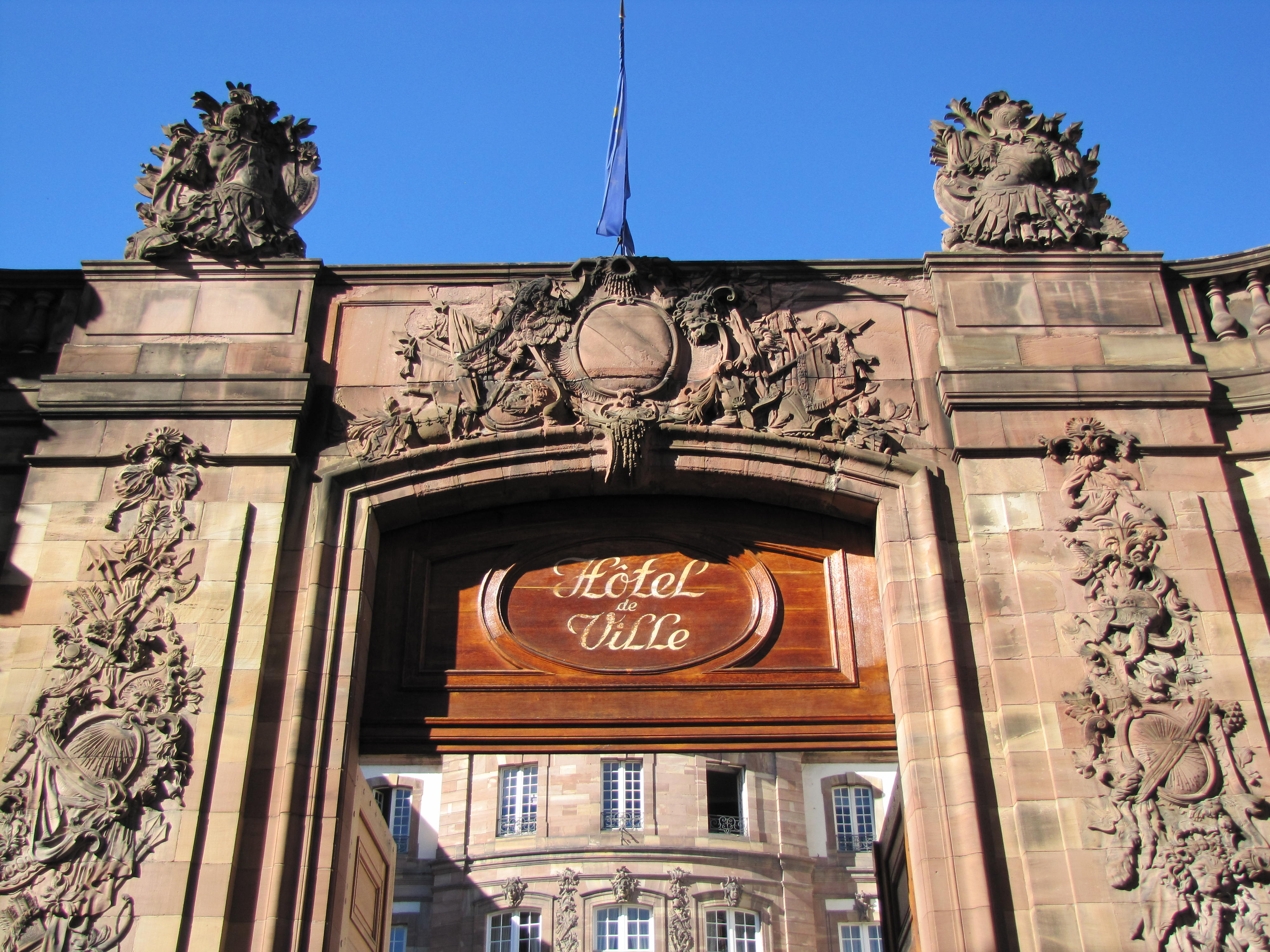 Alsace, Bas-Rhin, Strasbourg, Ancien Hôtel des Comtes de Hanau-Lichtenberg (1736), puis Hôtel de Ville, 9 rue Brûlée. .